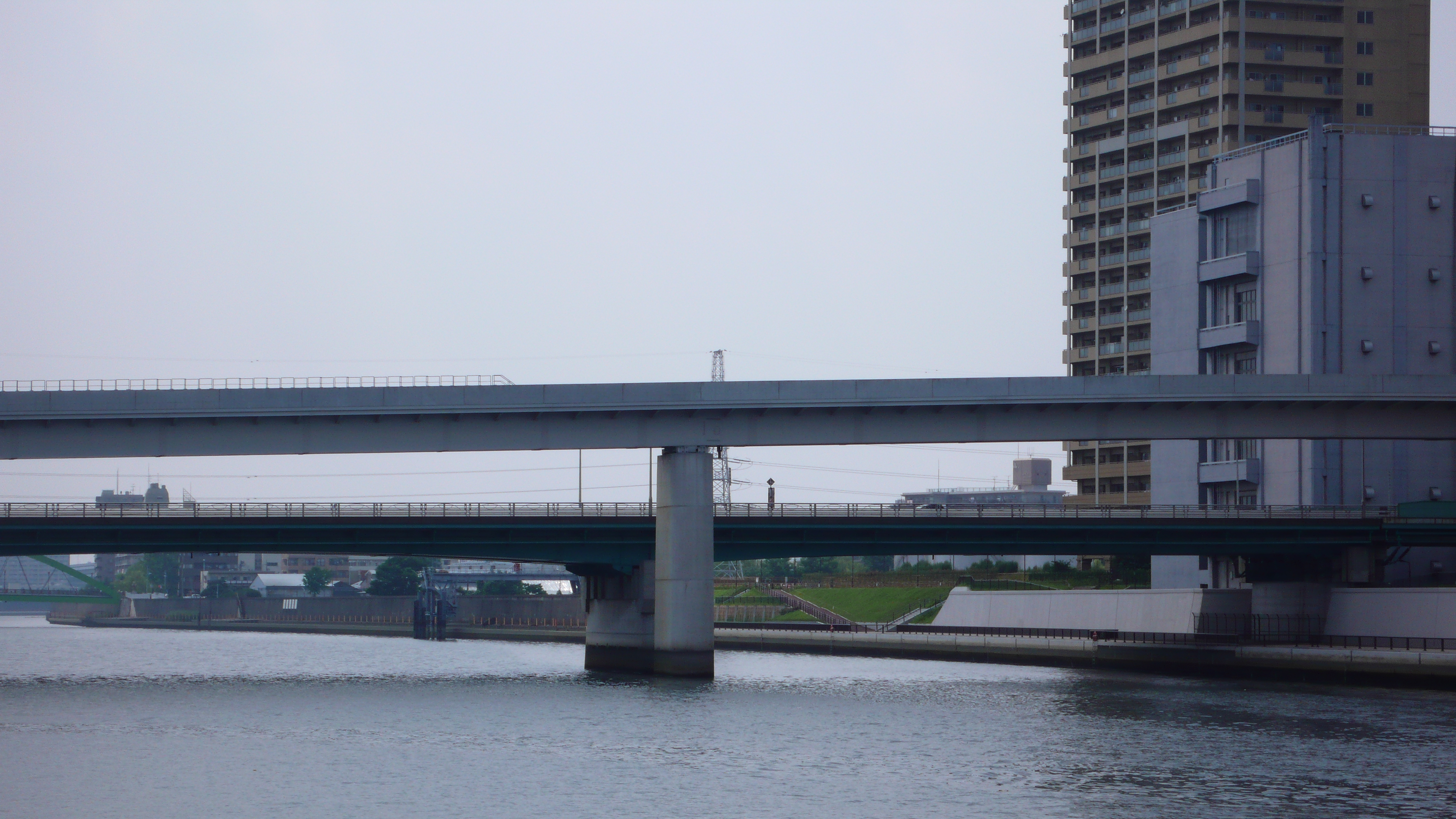 東京都足立区で隅田川にかかる「尾久橋」を撮影。